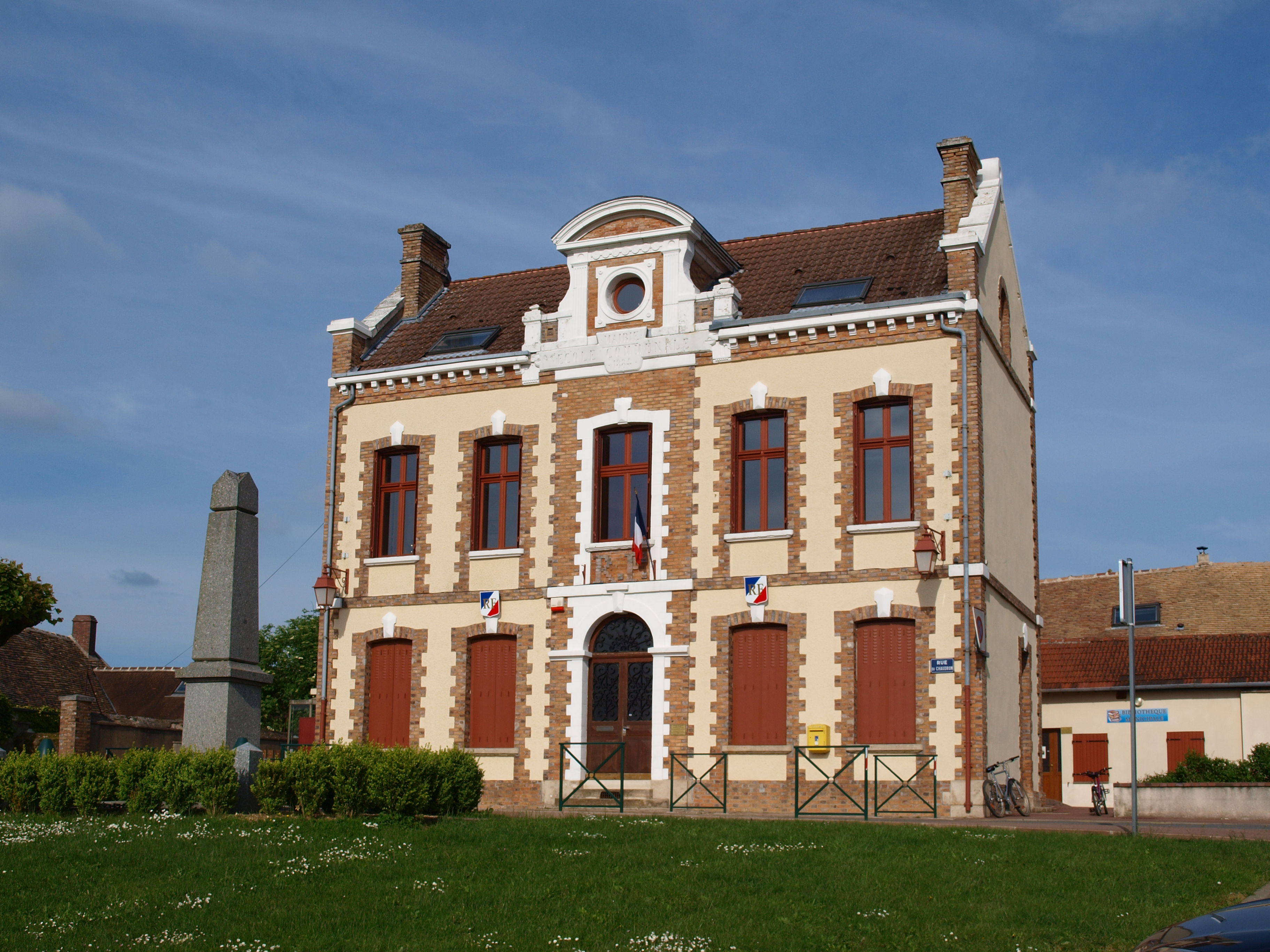 Saint-Agnan (Yonne, France)